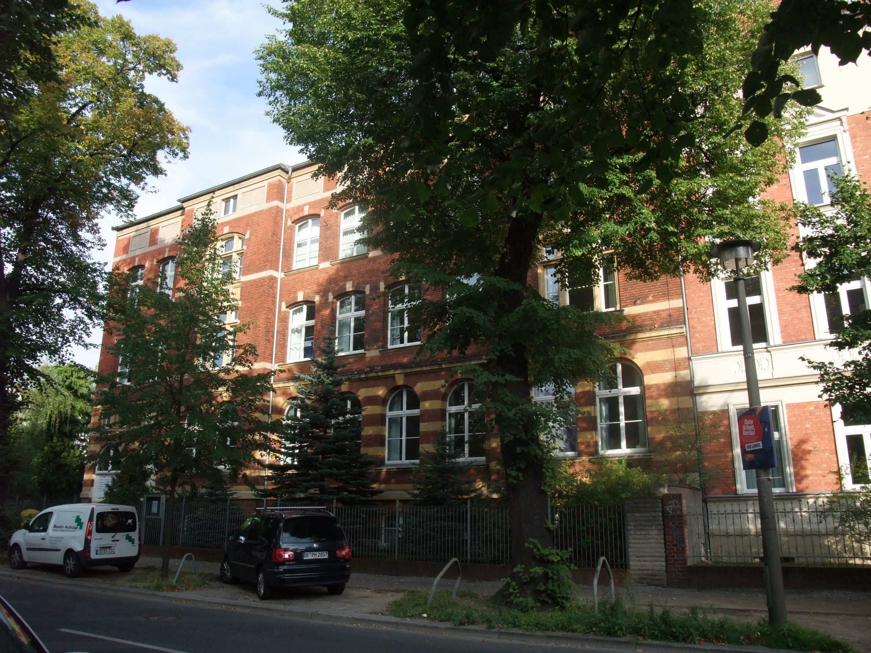 Israelitische Taubstummen-Anstalt für Deutschland, heute Elisabeth Schulen in Parkstraße 22, Berlin-Weißensee. Baudenkmal OBJ-Dok-Nr.: 09046380, erbaut 1889-1891, Architekten Johann Hoeniger. Jos. Henigerm M. Reich, Bauherr Verein "Freunde der Taubstummen - Jedide Ilmim"